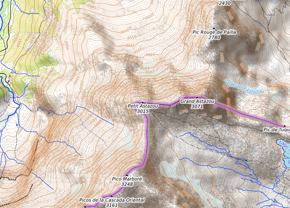 carte réalisée sur umap This map may be incomplete, and may contain errors. Don't rely solely on it for navigation.